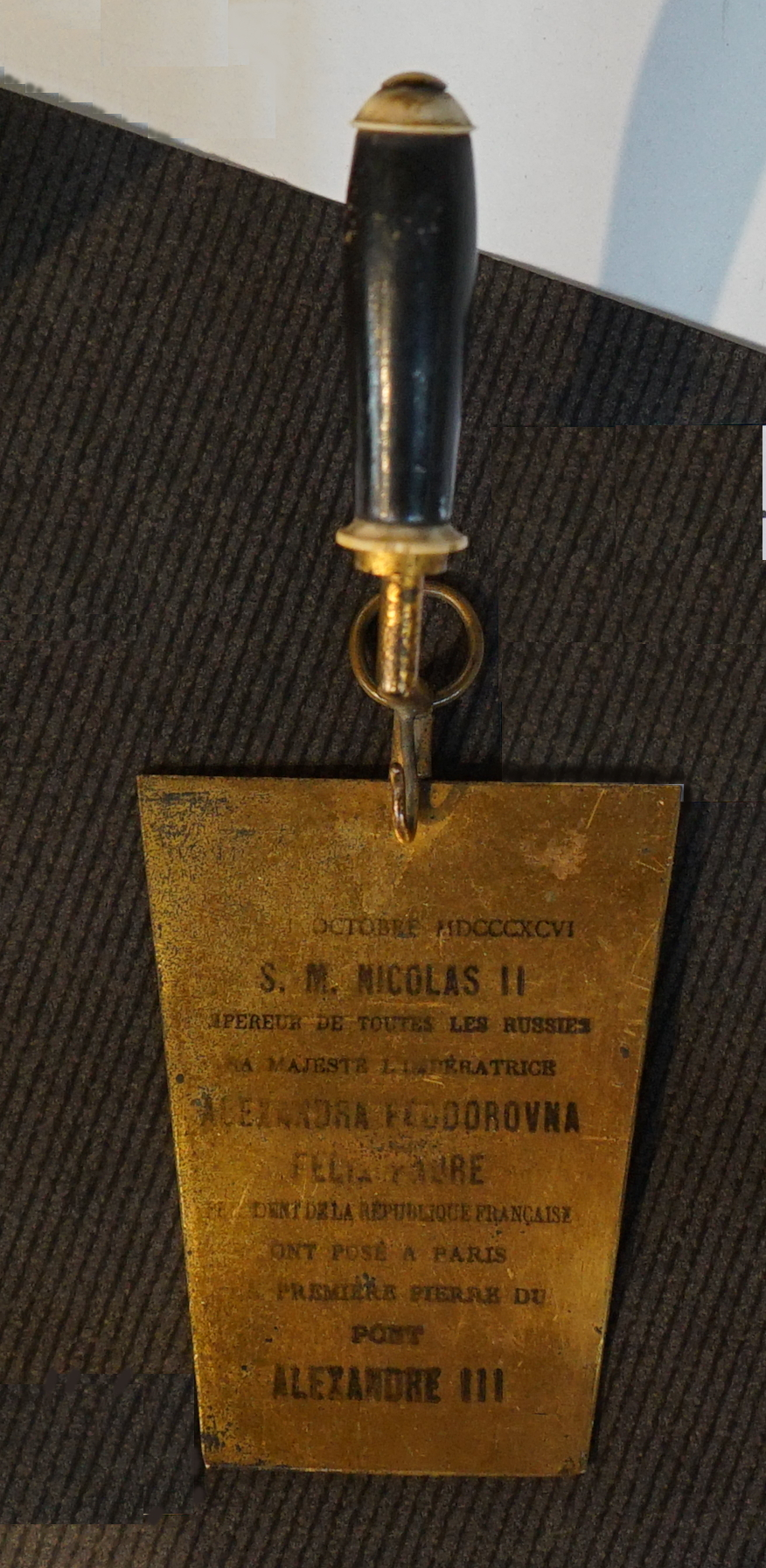 Truelle donnée par le tzar et la tzarinne aux officiels lors de l'inauguration du pont, présenté lors de l'exposition.Inscription en lettres majuscules: ?? octobre MDCCCXCVI / S. M. Nicolas II / Empéreur de toutes les Russies / Sa Majesté l'Impératrice Alexandra Féodorovna / Félix Faure / président de la République Française / ont posé à Paris / la première pierre du / Pont / Alexandre III.